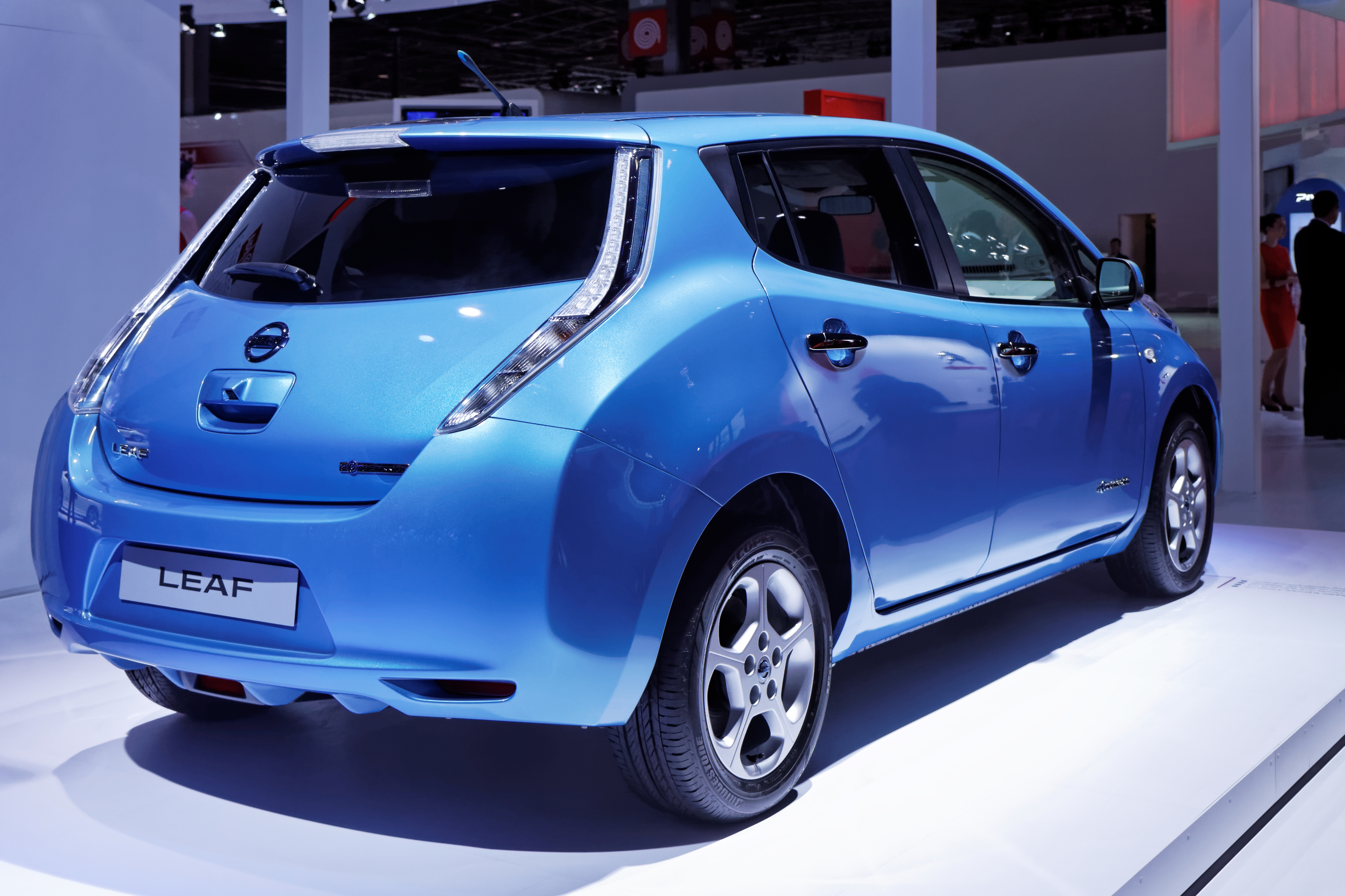 Une Nissan Leaf présentée lors du Mondial de l'Automobile de Paris 2012.